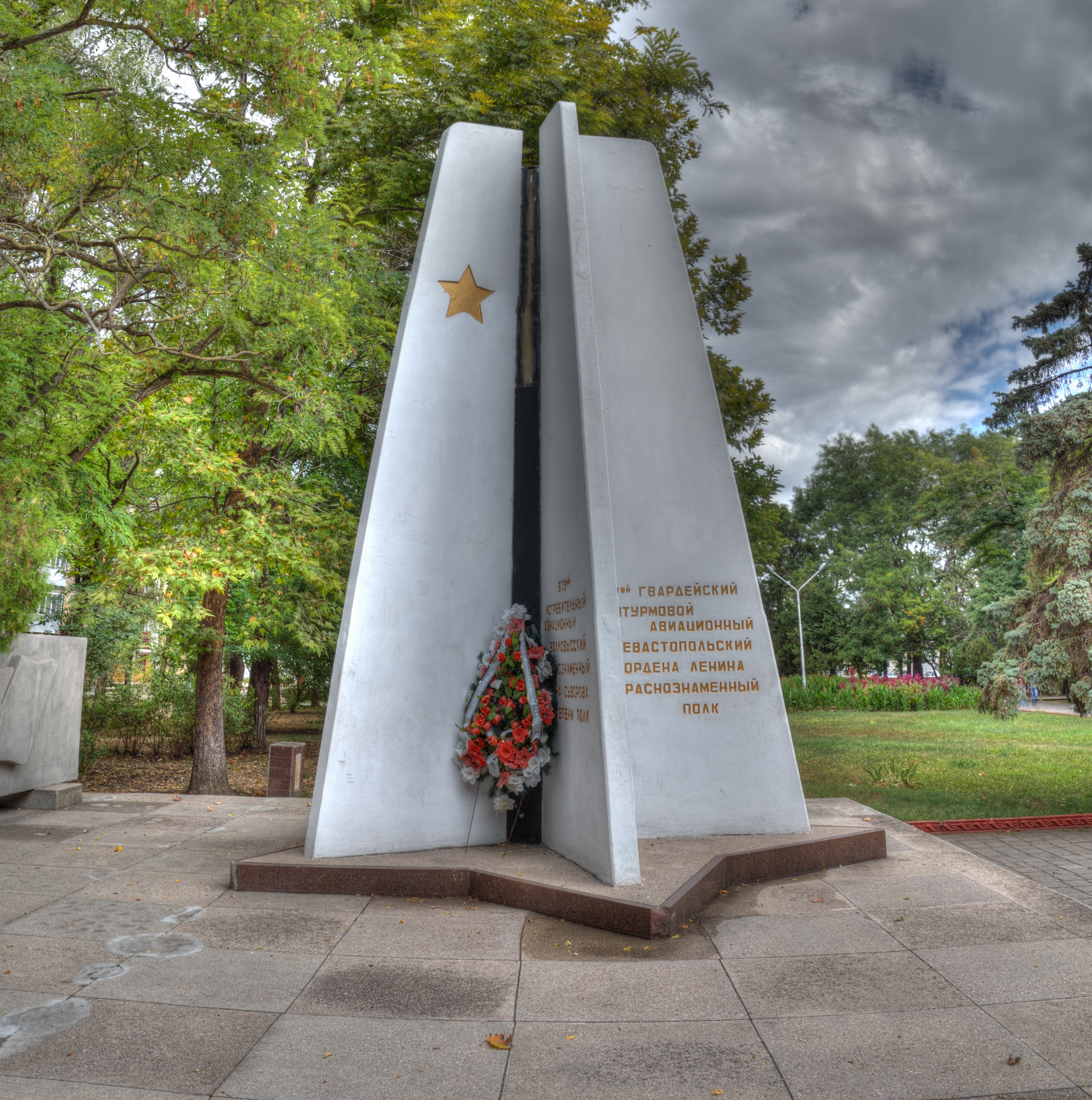 Пам'ятний знак в честь радянських льотчиків. Дата подій: 1942–1945 рр.. Дата споруди: 1965 р., Керч, вул. Кірова, сквер Льотчиків